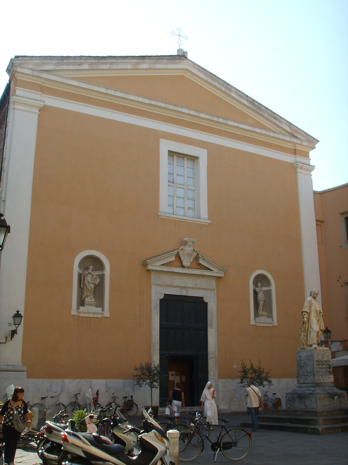 Chiesa del carmine, pisa, facciata